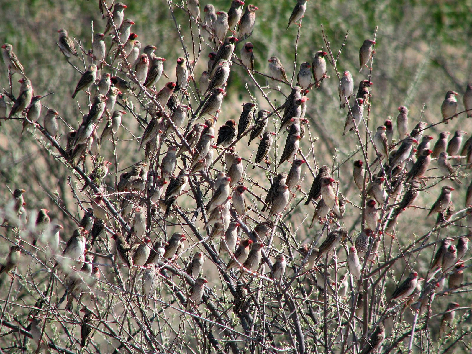 Red-billed Quelea (Quelea quelea